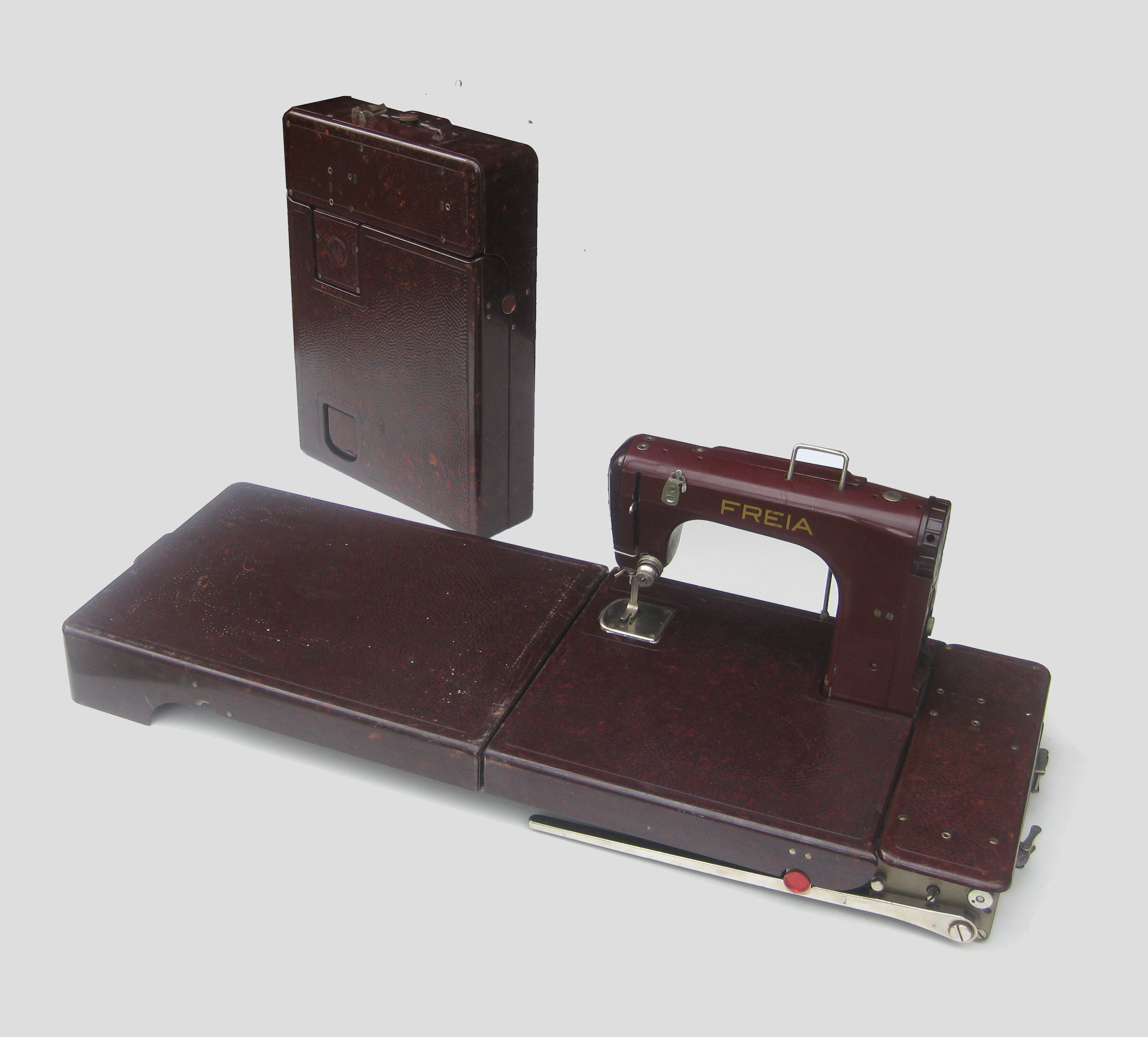 Koffer-Nähmaschine Freia geöffnet und im Koffer. Hersteller: VEB MEWA Ernst-Thälmann-Werk Suhl, 1948; Konstrukteur und Gestalter: Ernst Fischer